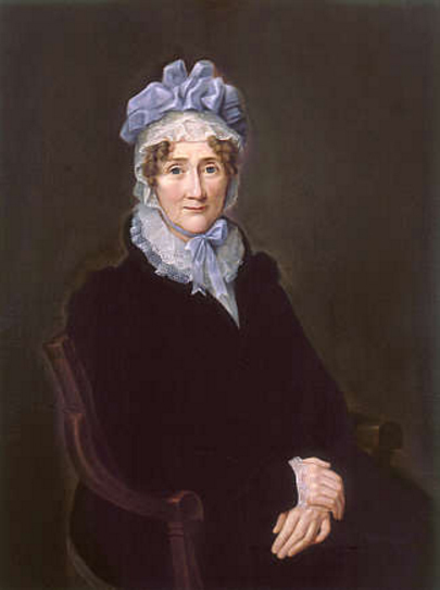 Altersbildnis der „Charlotte Kestner mit blauer Haube“ als Kopie des hannoverschen Christian Ahrbeck nach einem Ölgemälde des Kieler Porträtisten Johann Ludwig Hansen dem Älteren angefertigt, mutmaßlich für die im im Elsass lebende Verwandtschaft der in Hannover wohnenden Charlotte Kestner, geborene Buff. Das Gemälde findet sich im Historischen Museum Hannover ...